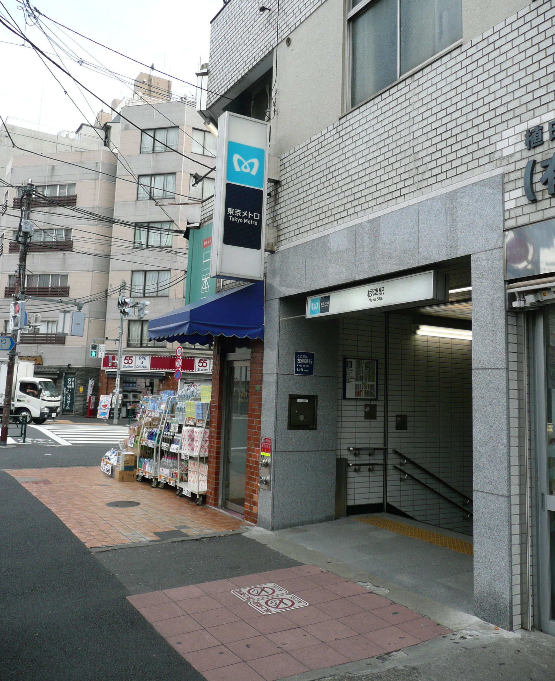 根津駅1番出入口